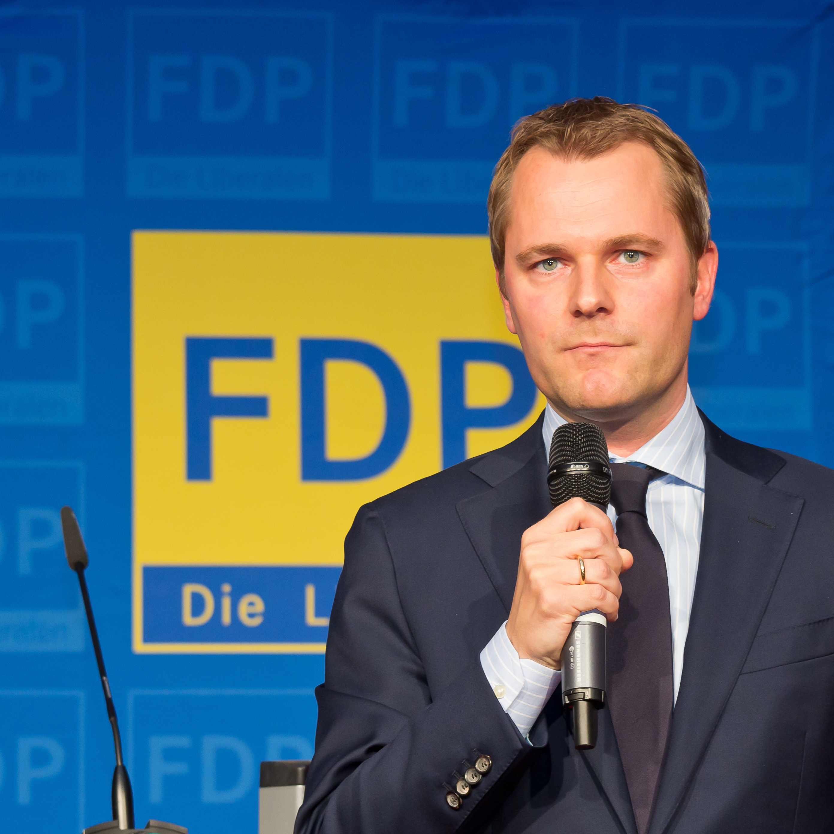 FDP-Wahlkampfkundgebung in der Wolkenburg Köln. Im Bild: Bundesgesundheitsminister Daniel Bahr